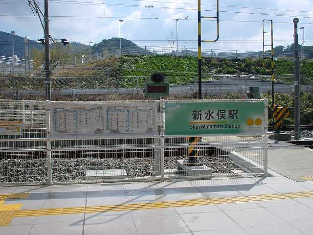 新水俣駅（2005年3月投稿者が撮影）